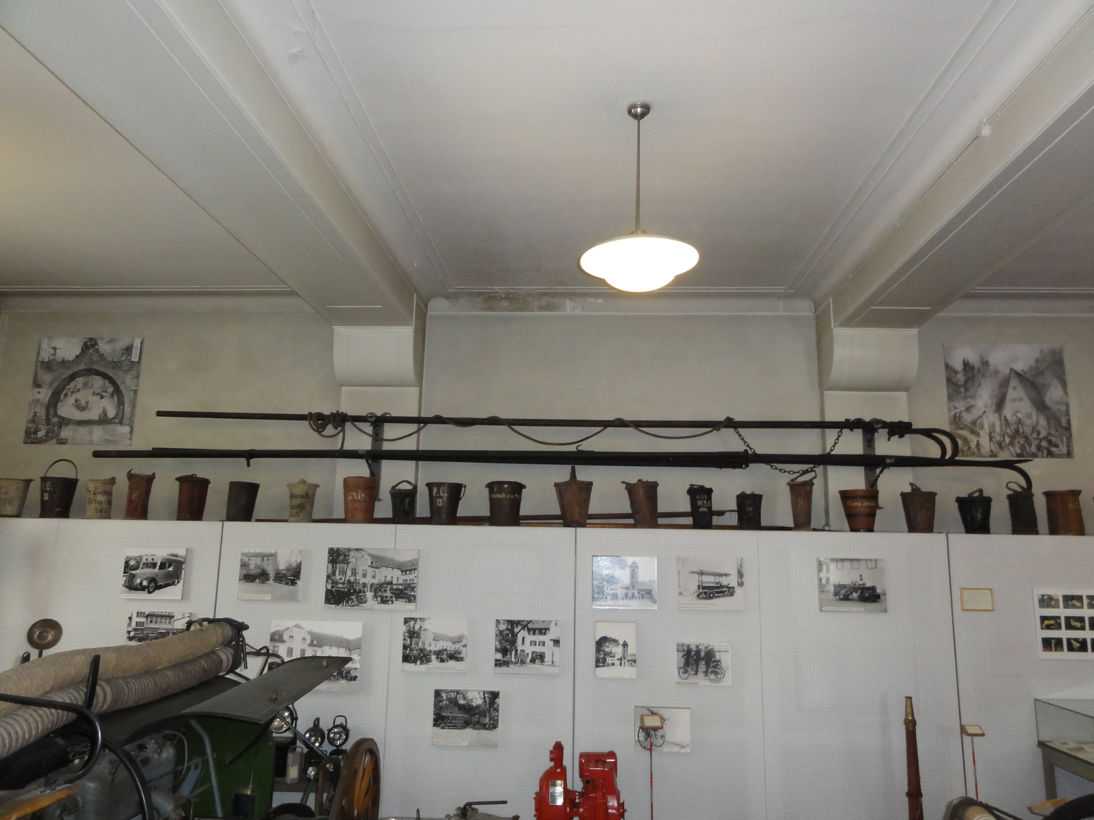 Basel — Schweizerisches Feuerwehrmuseum Basel-Stadt